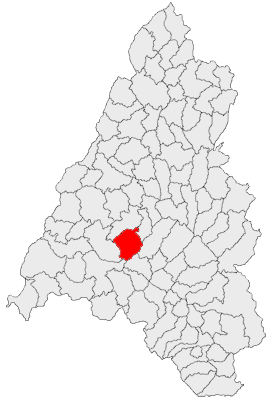 Categorie:Hărţi ale judeţului Bihor